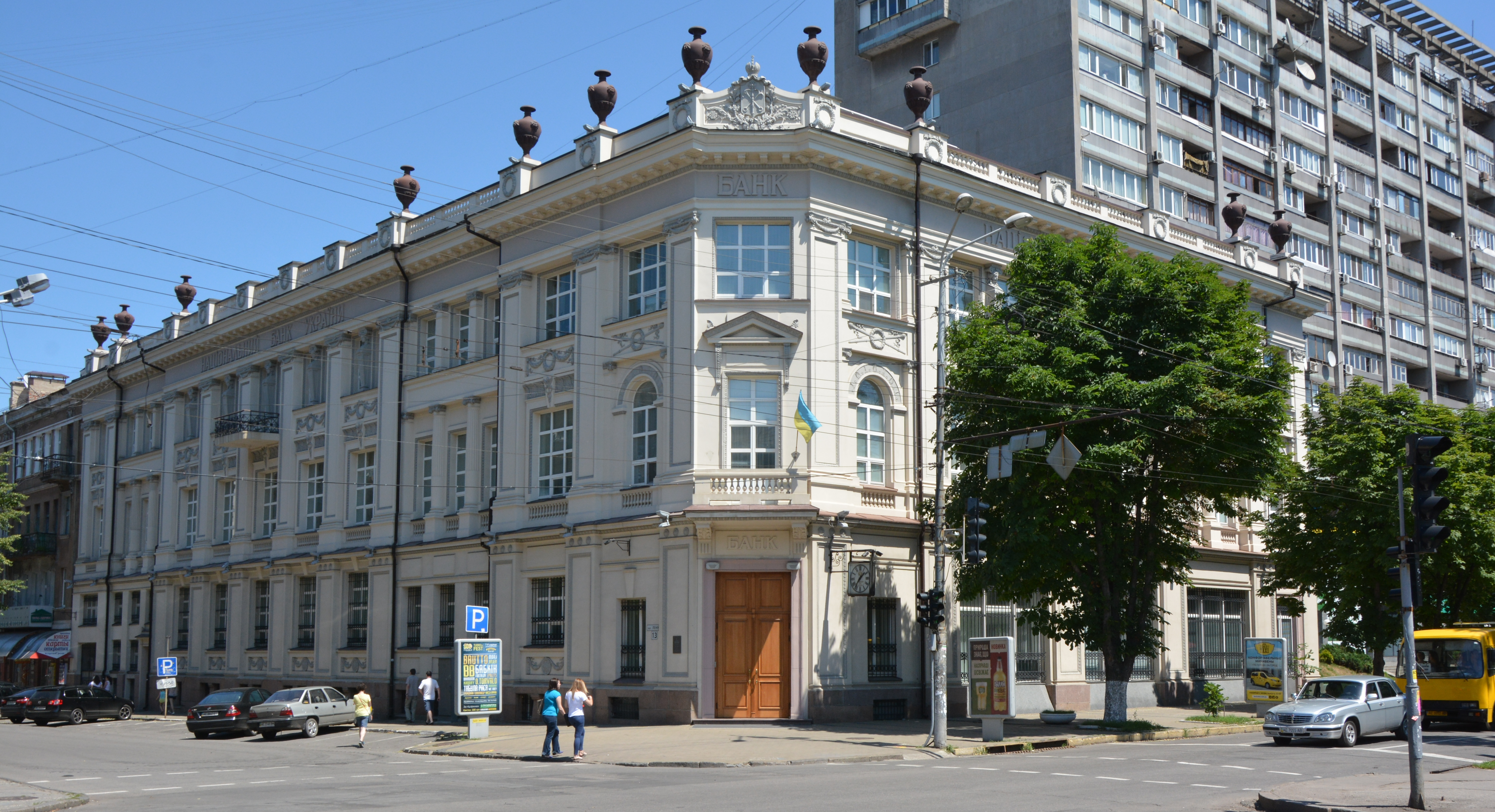 Будинок адміністративний Управління Національного банку України в Дніпропетровській області (Будинок Катеринославського відділення Санкт-Петербурзького комерційного банку), Дніпро, вул. Воскресенська, 13